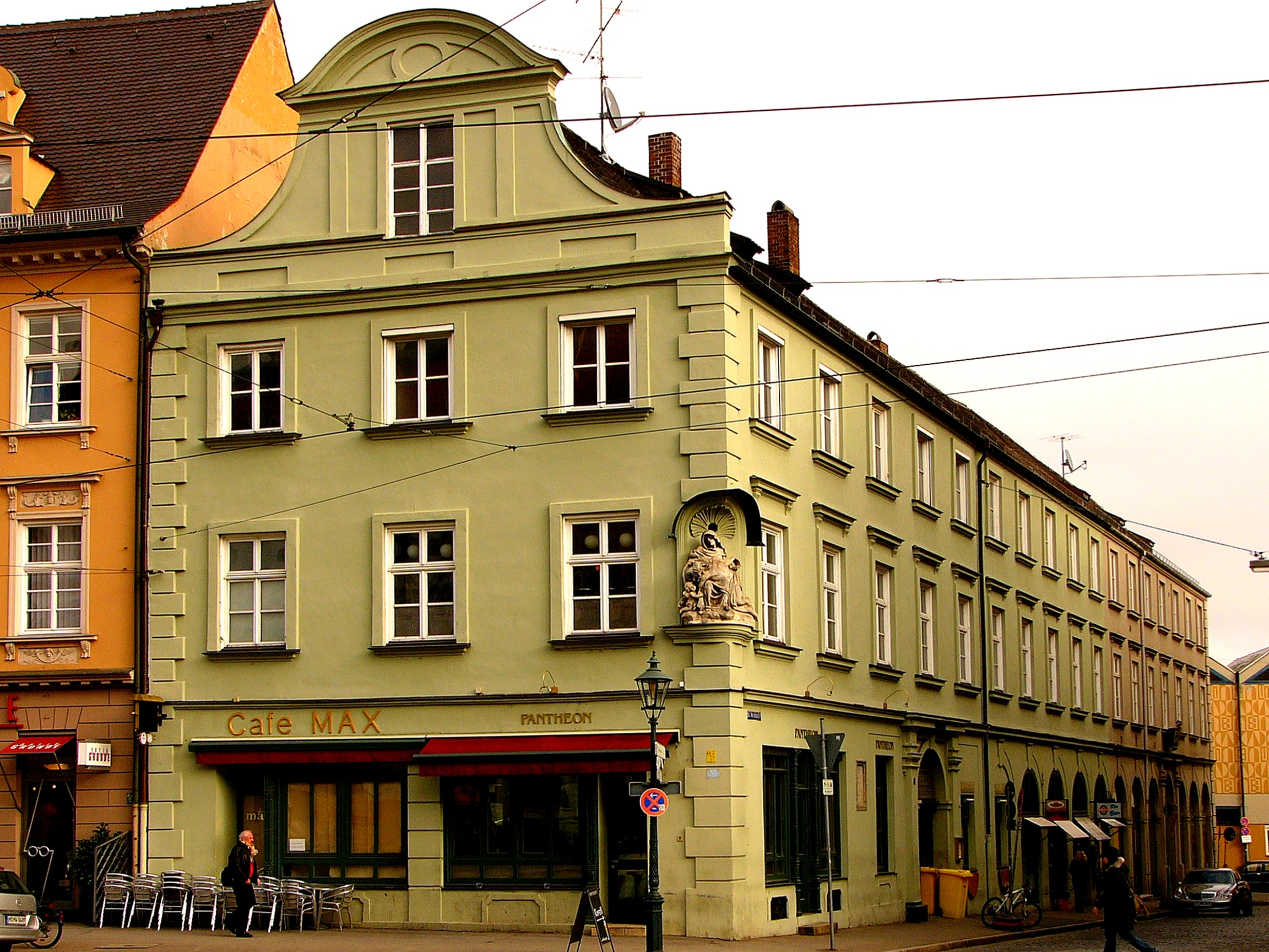 Ehem. reichsstädtisches Kaufhaus; langgestreckter dreigeschossiger Traufseitbau mit Satteldach und geschweiftem Giebel zur Maximilianstraße, von Elias Holl unter Verwendung eines Planes von Matthias Kager, 1611, Giebel wohl um 1700This is a photograph of an architectural monument.